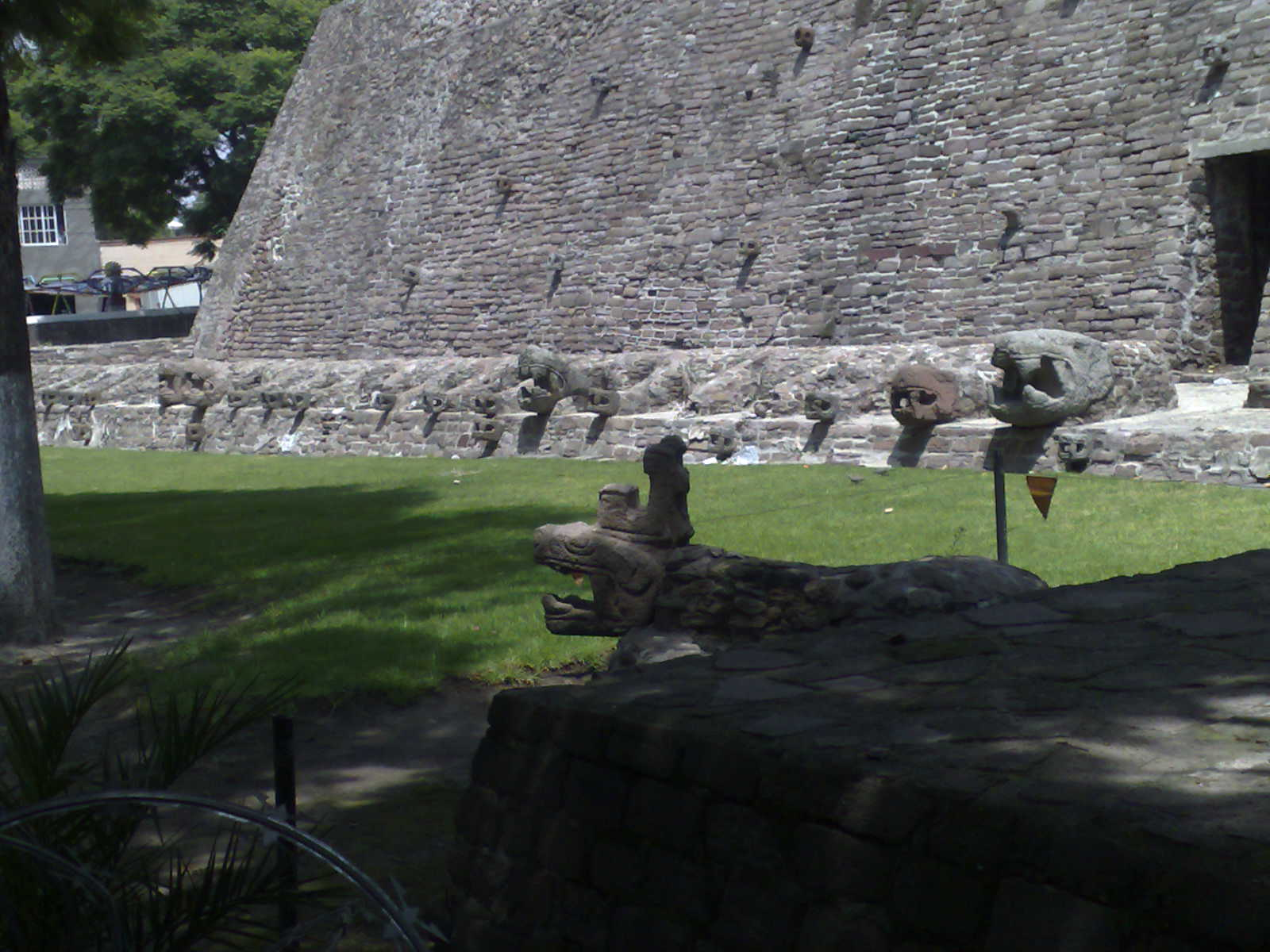 Pirámide de Tenayuca ("Gran Pirámide")